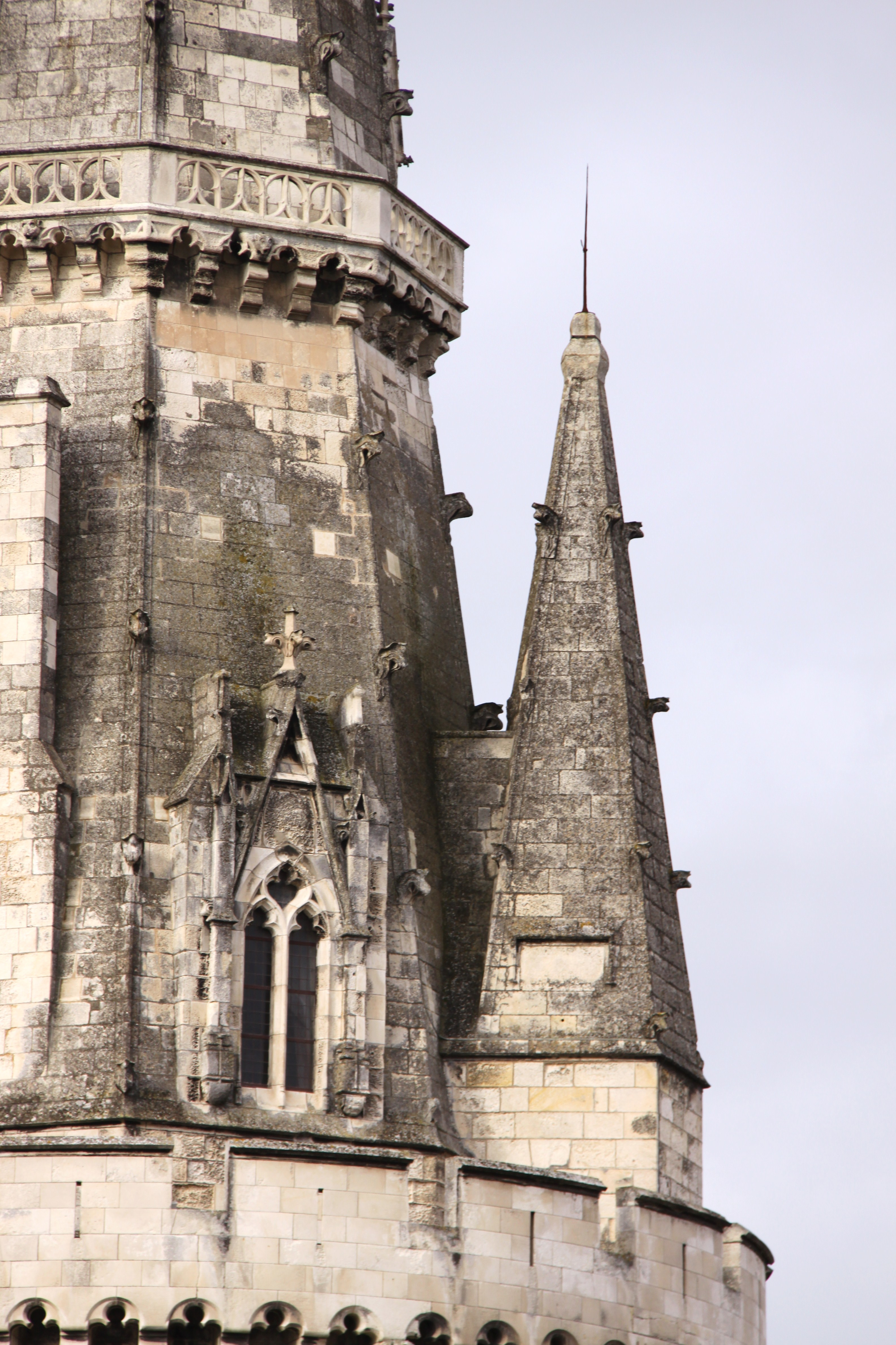 La Tour de la Lanterne. La Rochelle, Charente Maritime, France.